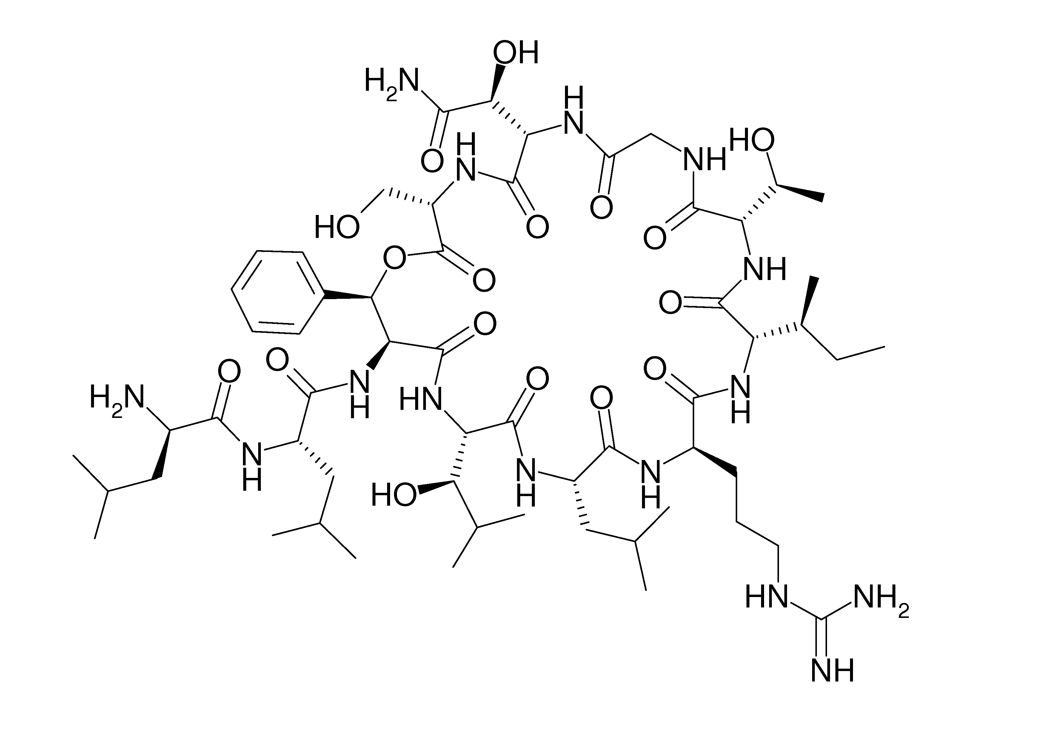 lysobactin (katanosin B)